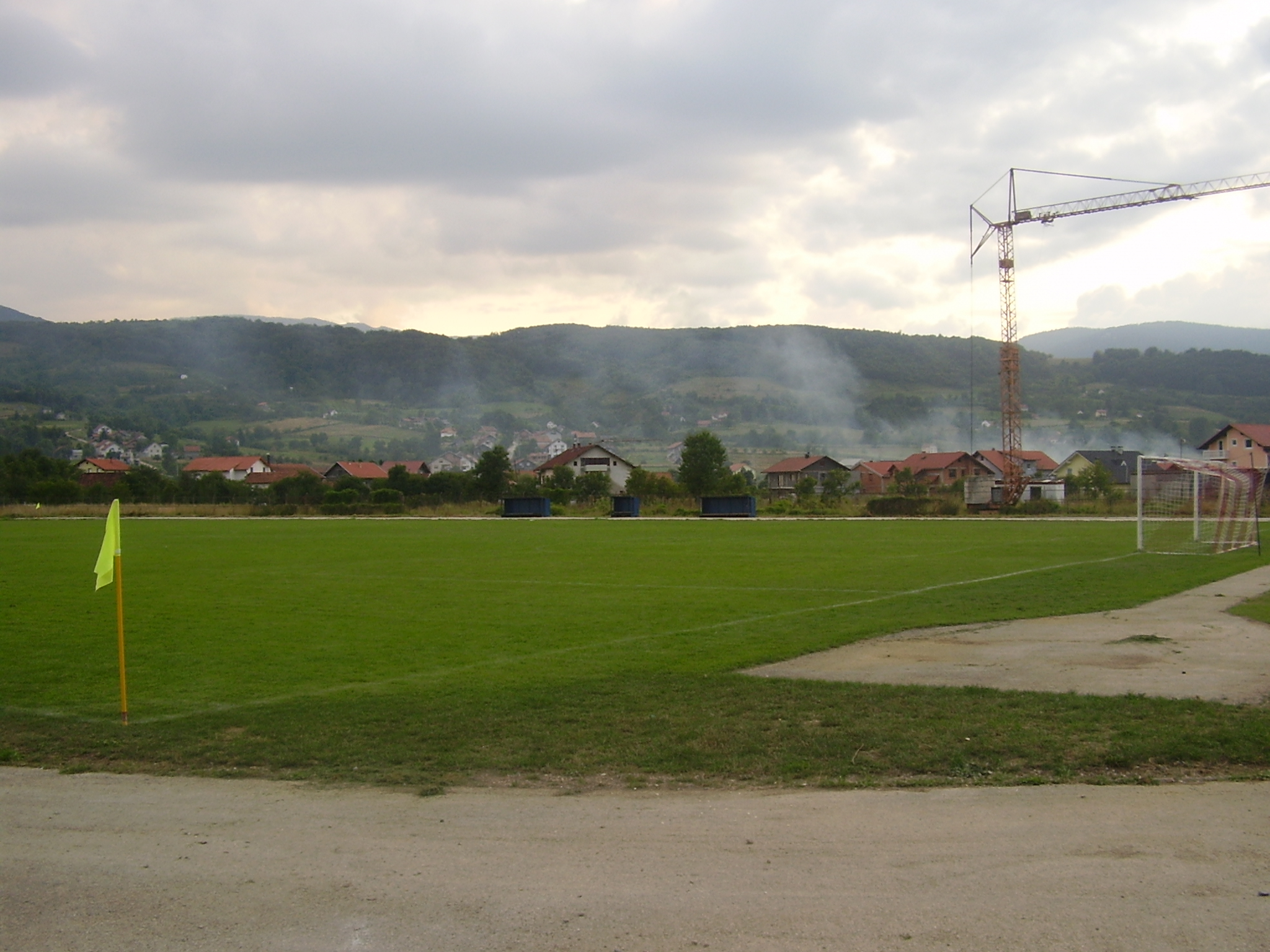 Gradski stadion Košute - Slogino